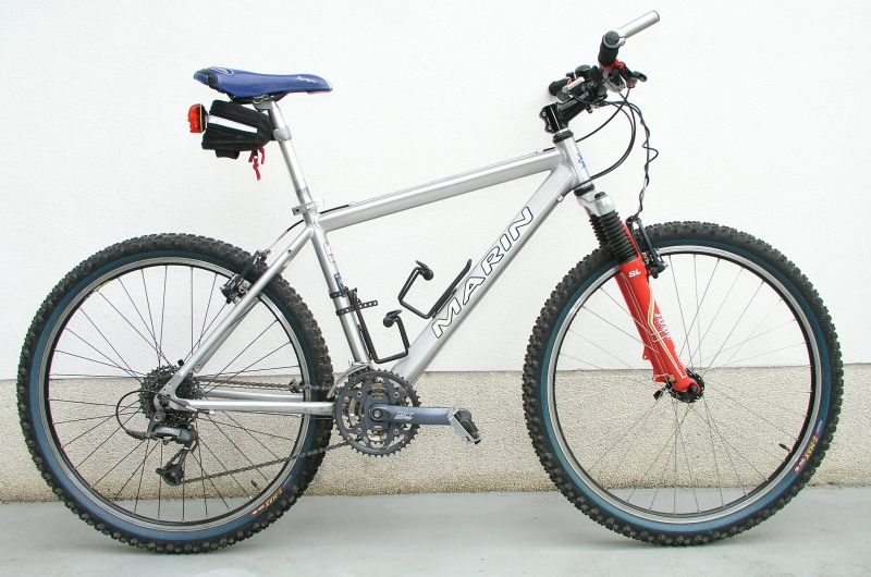 Marin MTB